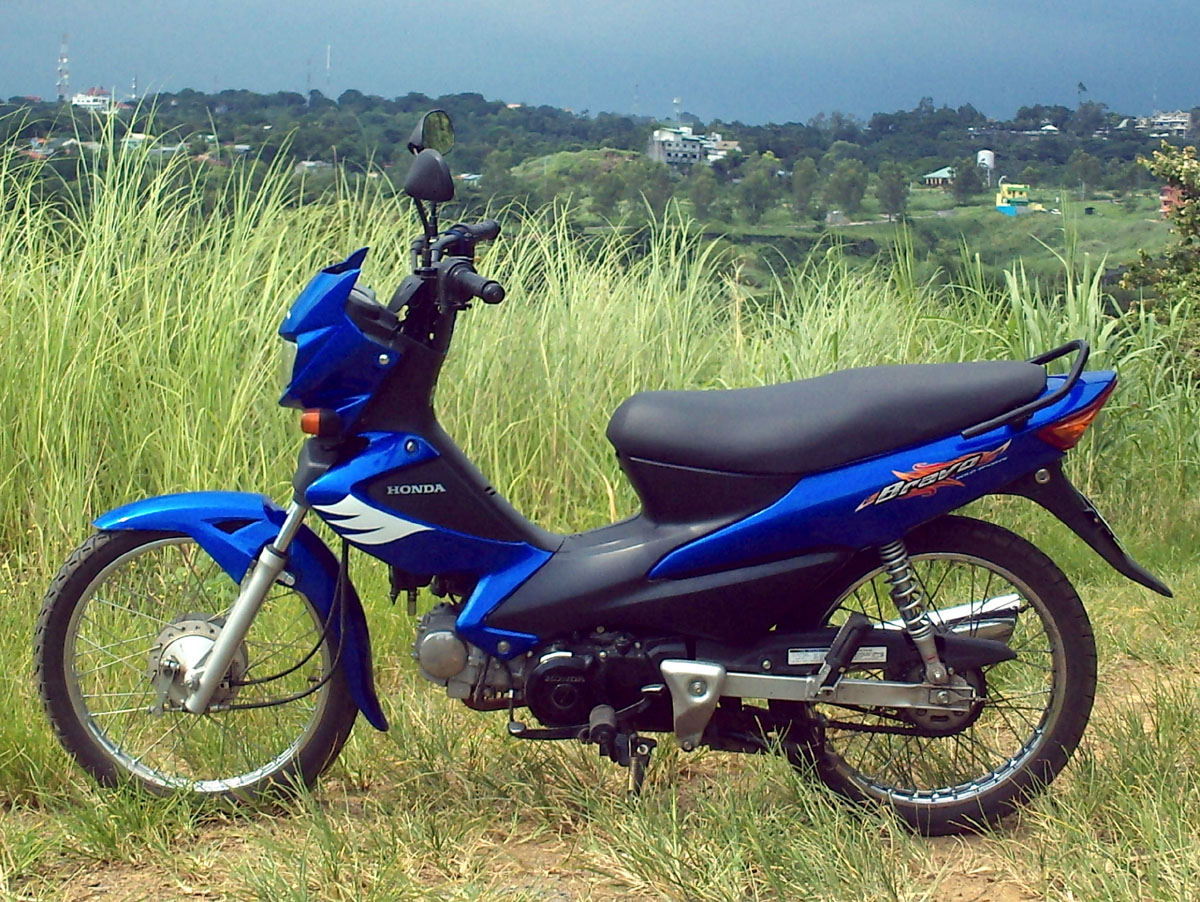 Honda Bravo